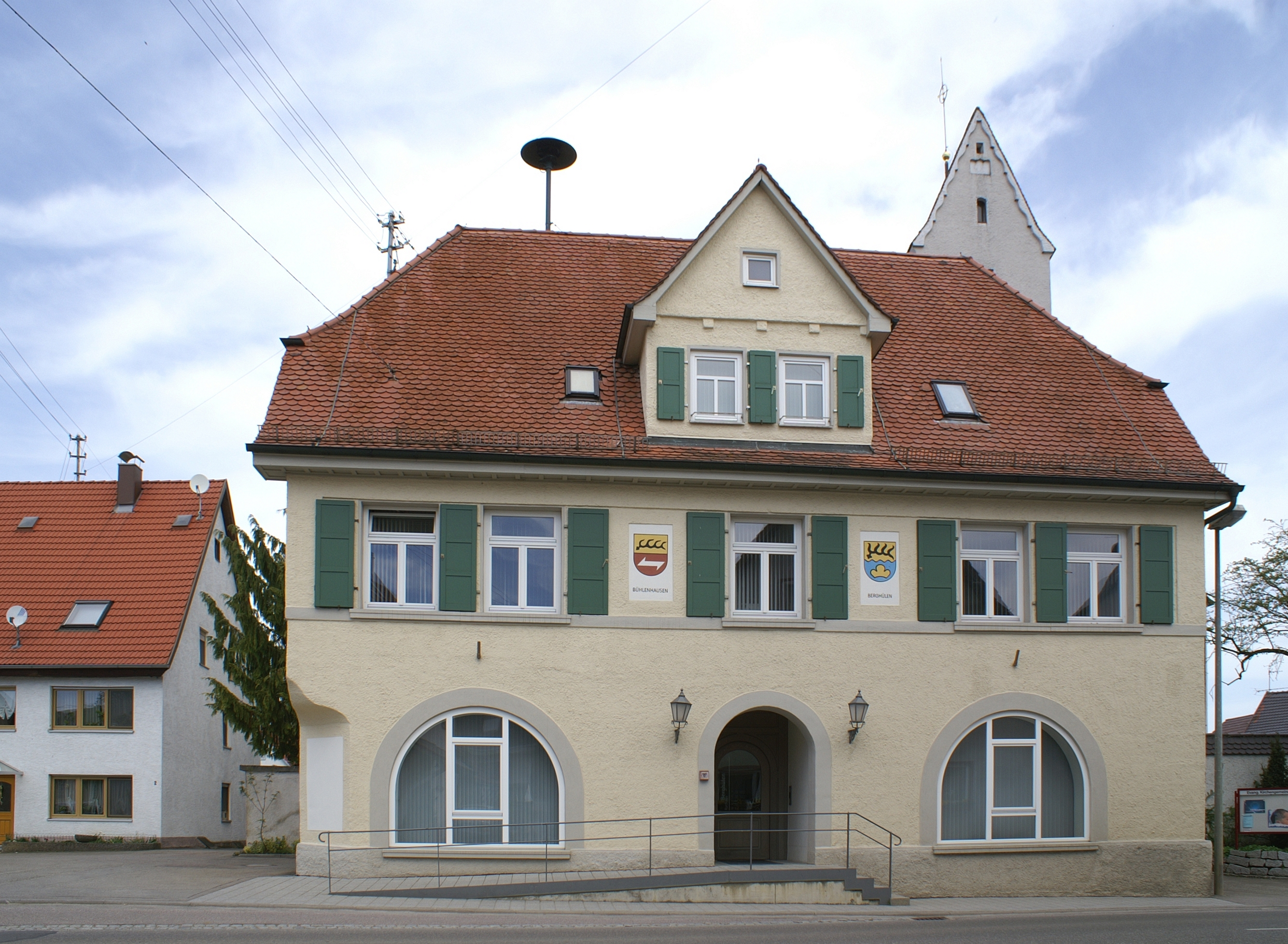 Rathaus in Berghülen. Im Hintergrund der Turm der Laurentius-Kirche.